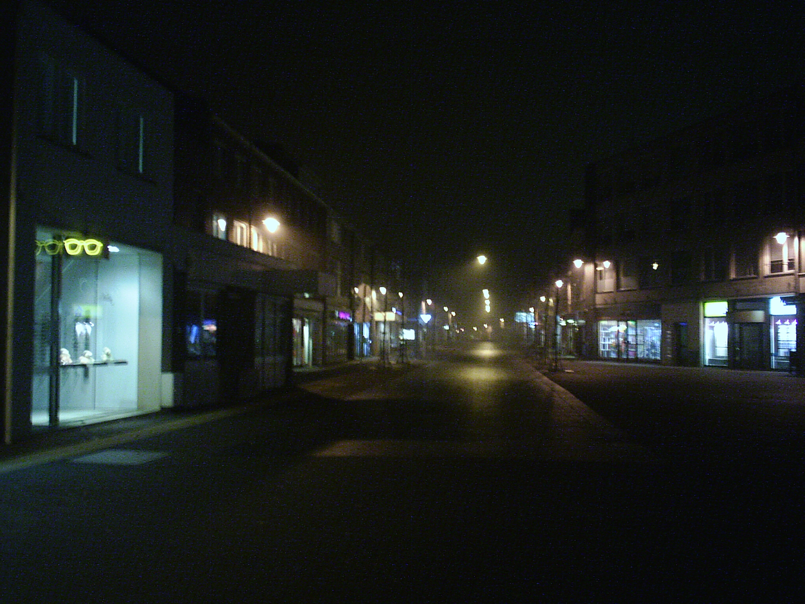 Foto gemaakt in winkelcentrum Blerick bij mist en nacht. Foto zelf gemaakt, met eigen fototoestel. Pven 1 feb 2006 22:01 (CET)